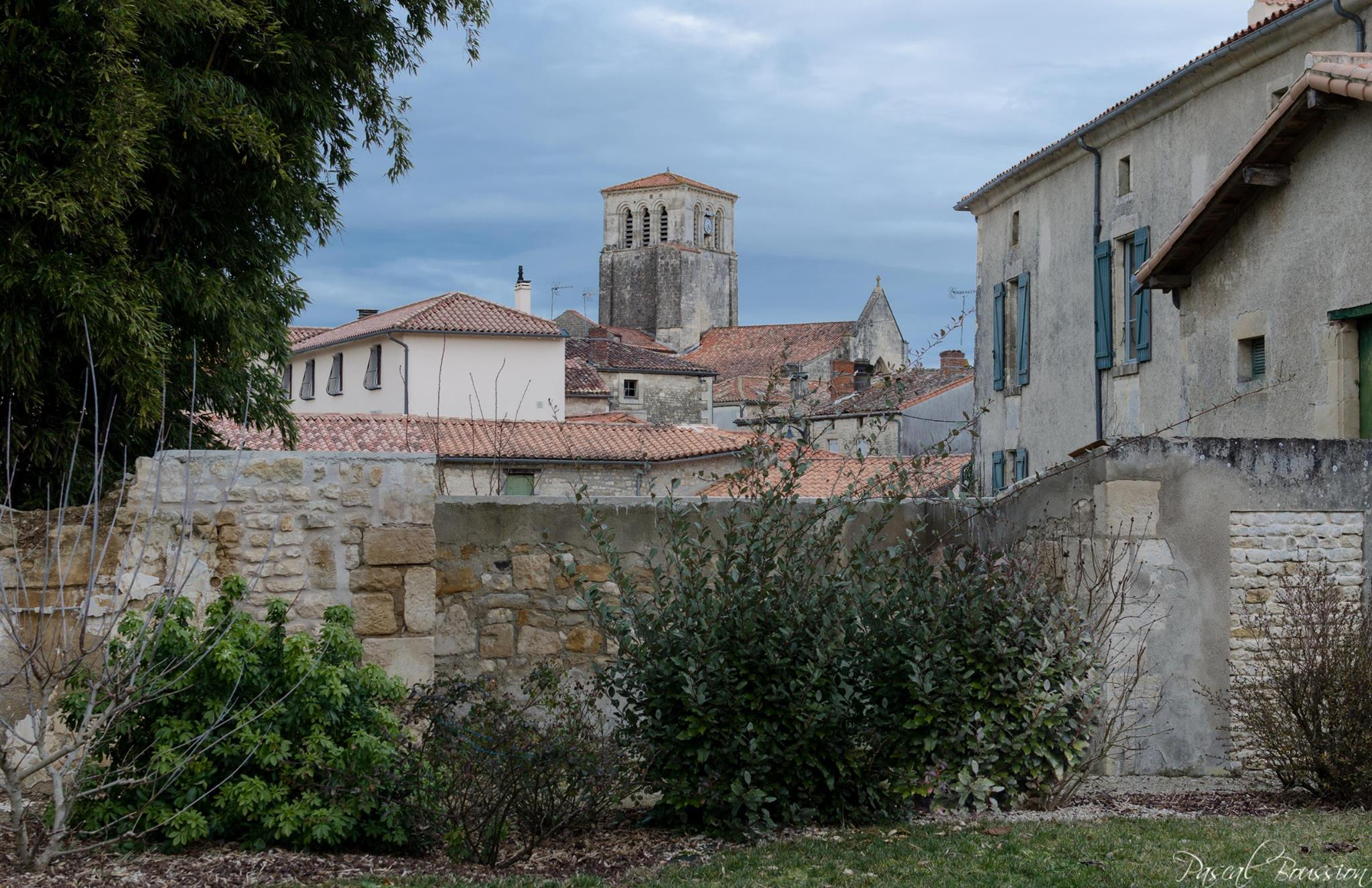 Façade de l'église Saint-Etienne